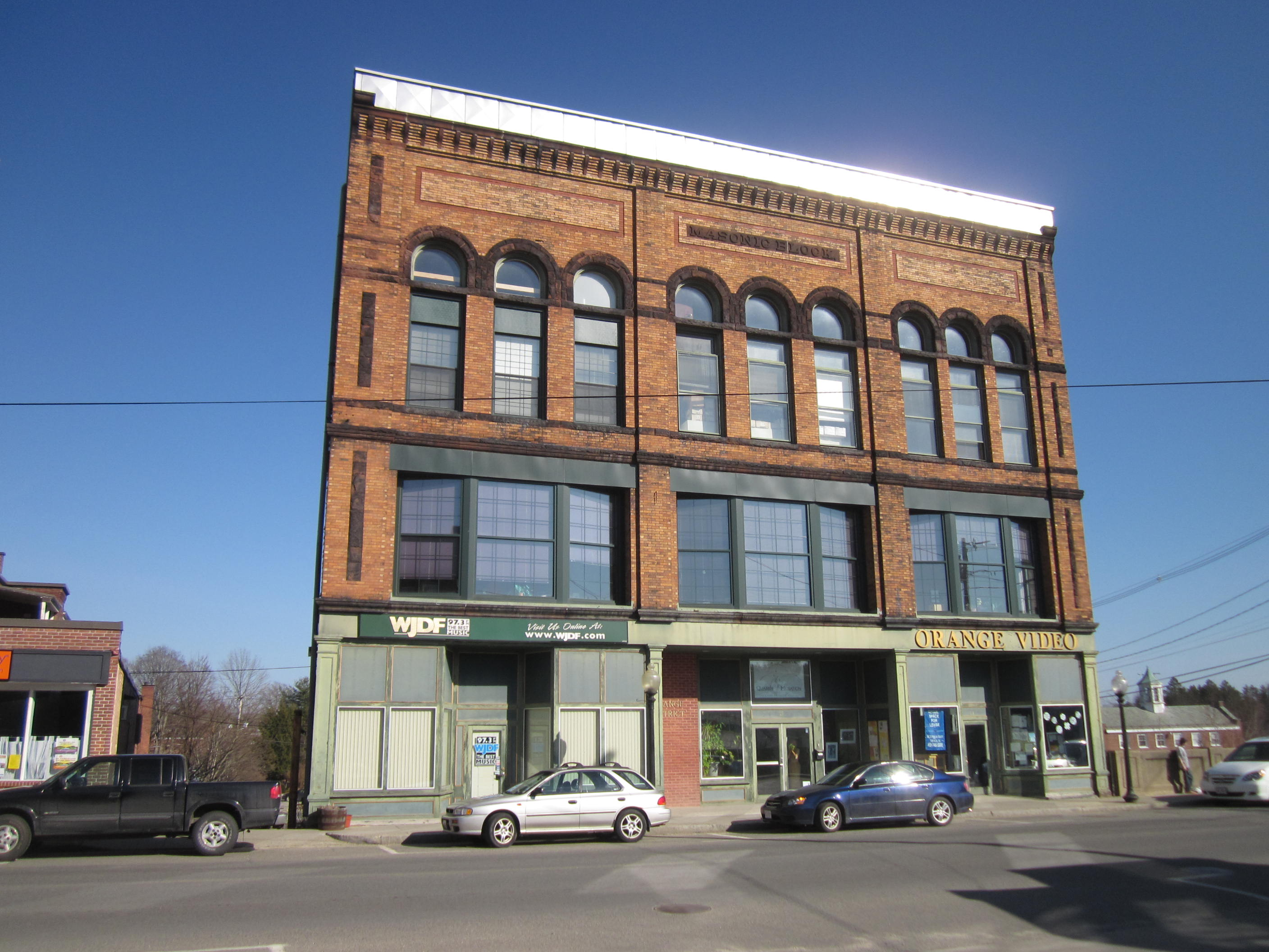 Orange, Massachusetts